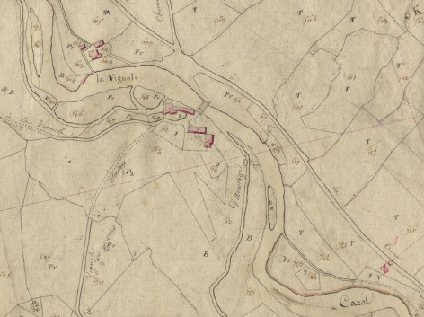 La Vinyola, d'Enveig, en el Cadastre Napoleònic del 1812 (Arxius Departamentals dels Pirineus Orientals)